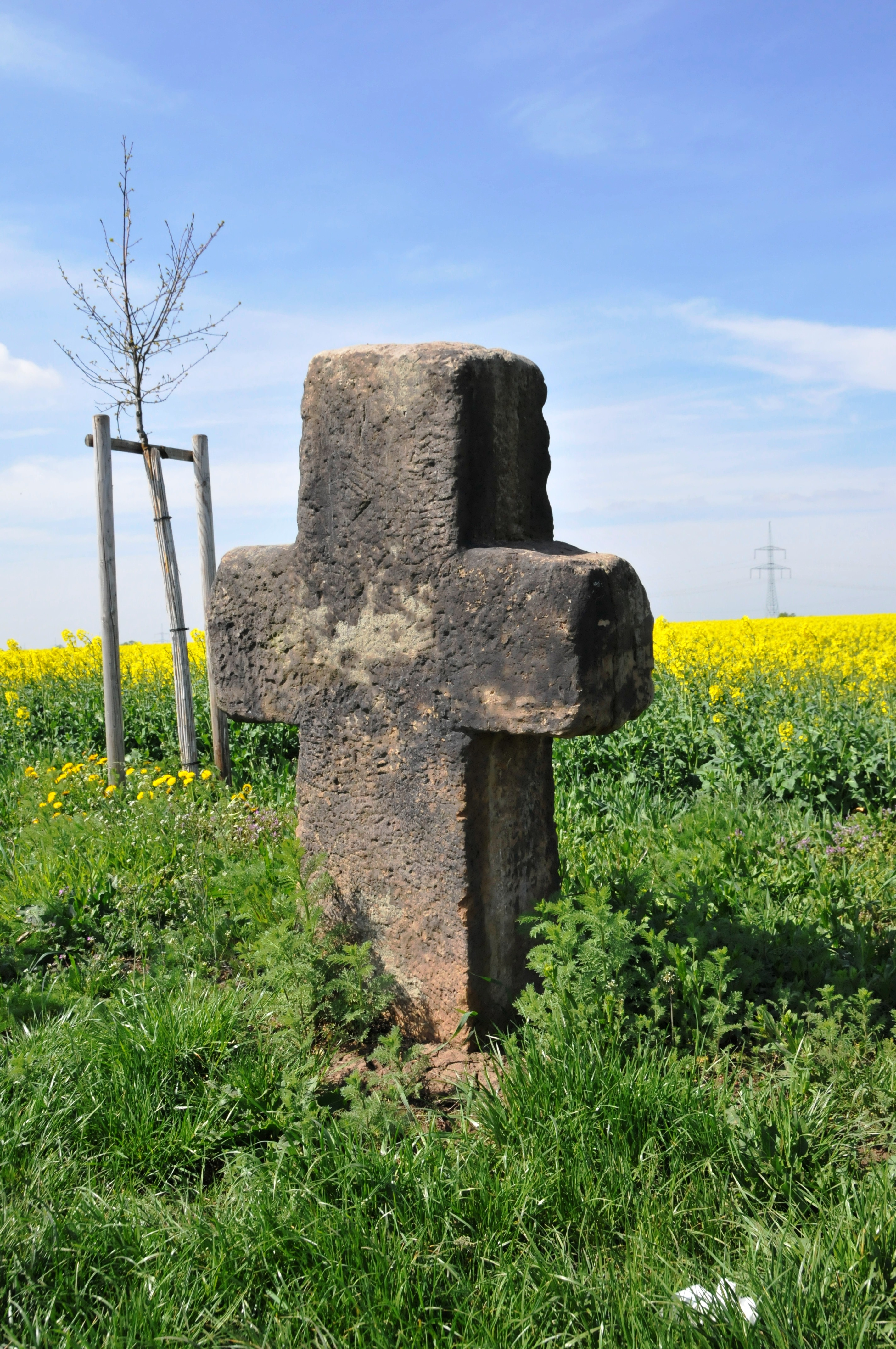 Kleinrettbach, Grabsleber Steinkreuz